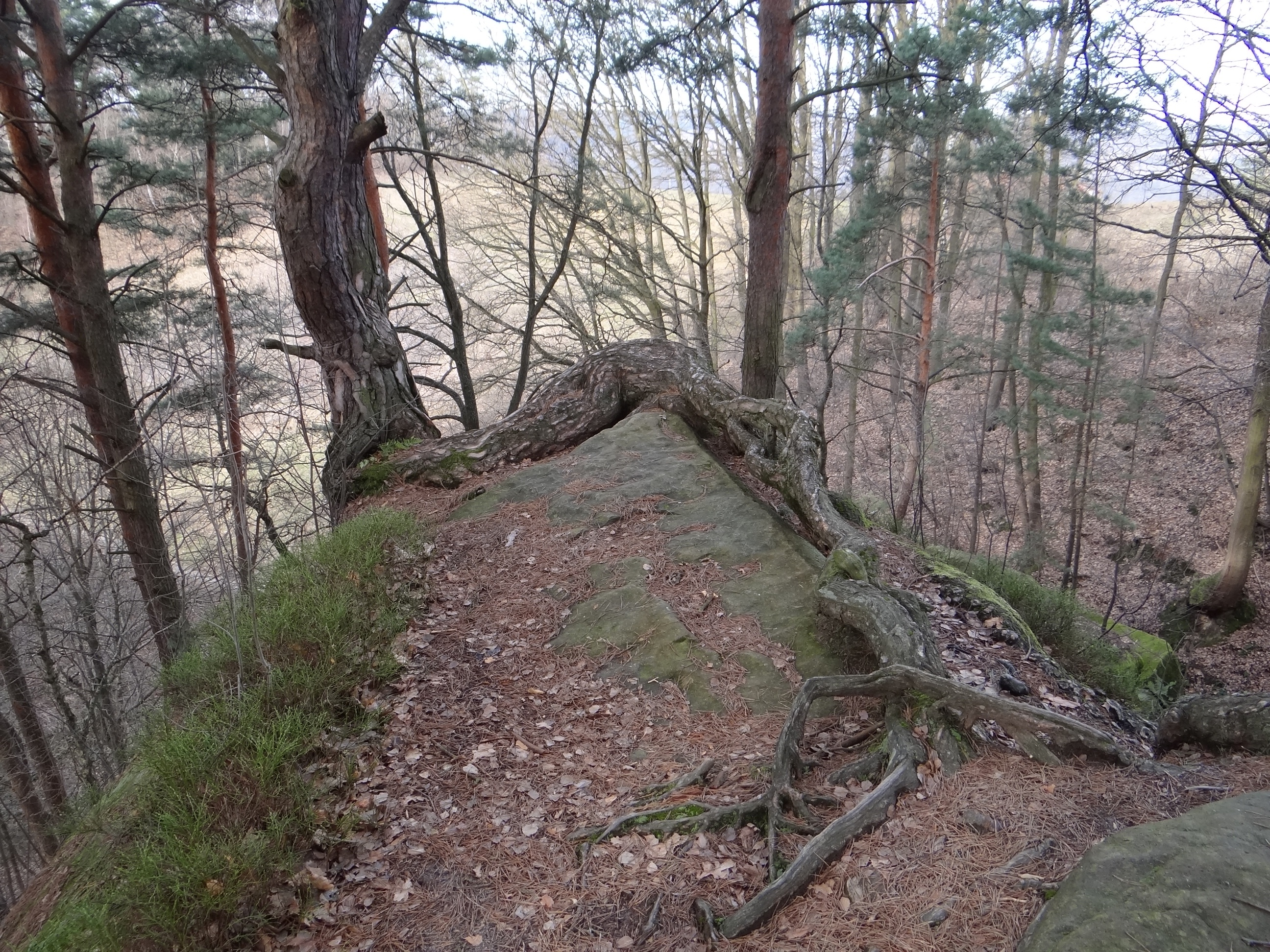 Korzeń {Aligator} w Skamieniałym Mieście w Ciężkowicach